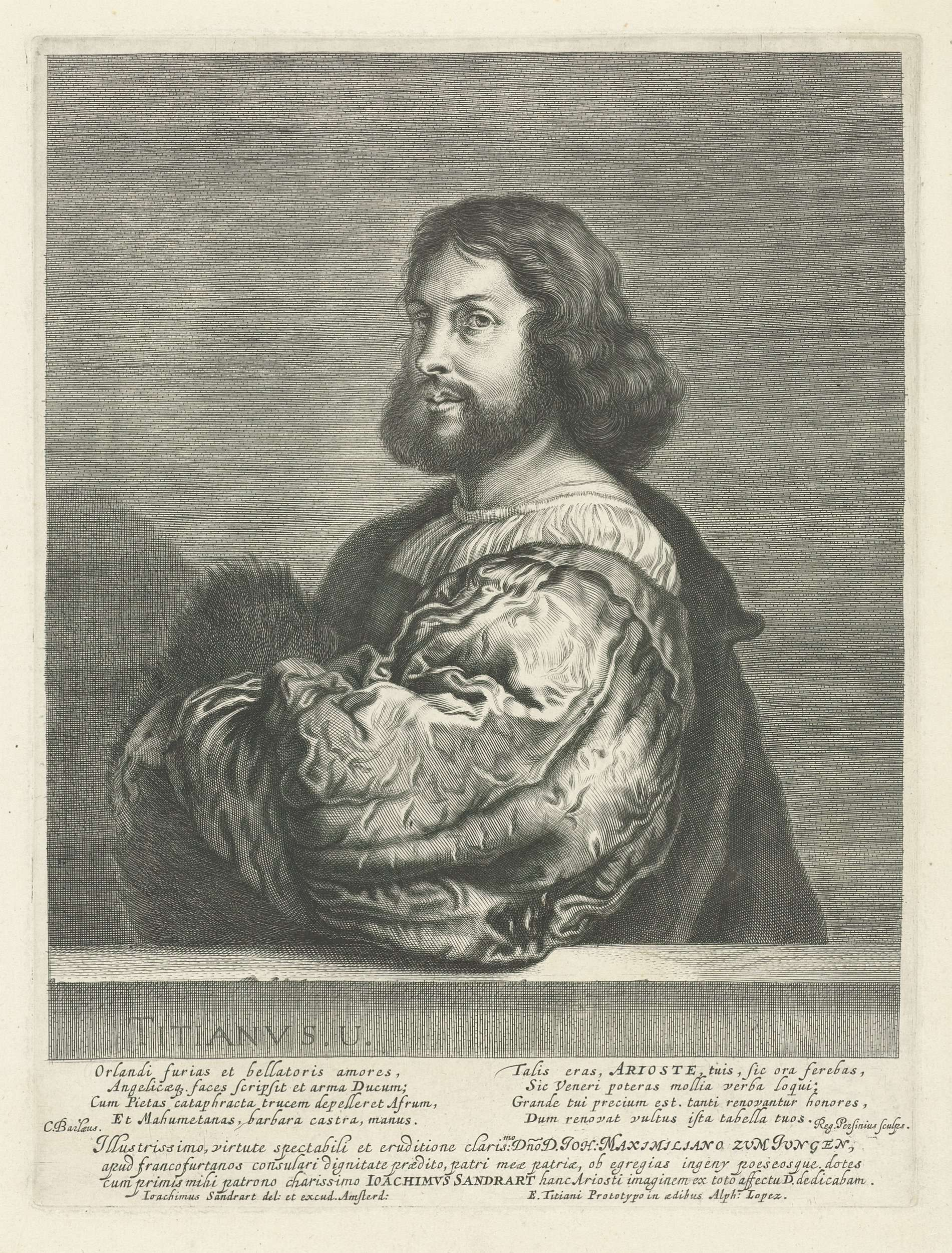 Retrato de Ludovico Ariosto, grabado de Reinier van Persijn por dibujo de Joachim von Sandrart. Al pie: F. Titiani, Prototypo in aedibus Alph: Lopez. Descartada la anterior identificación del retratado con Ariosto, en la actualidad se conoce como El hombre de la manga azul o según la National Gallery de Londres, donde se conserva, como retrato de Gerolamo (?) Barbarigo.